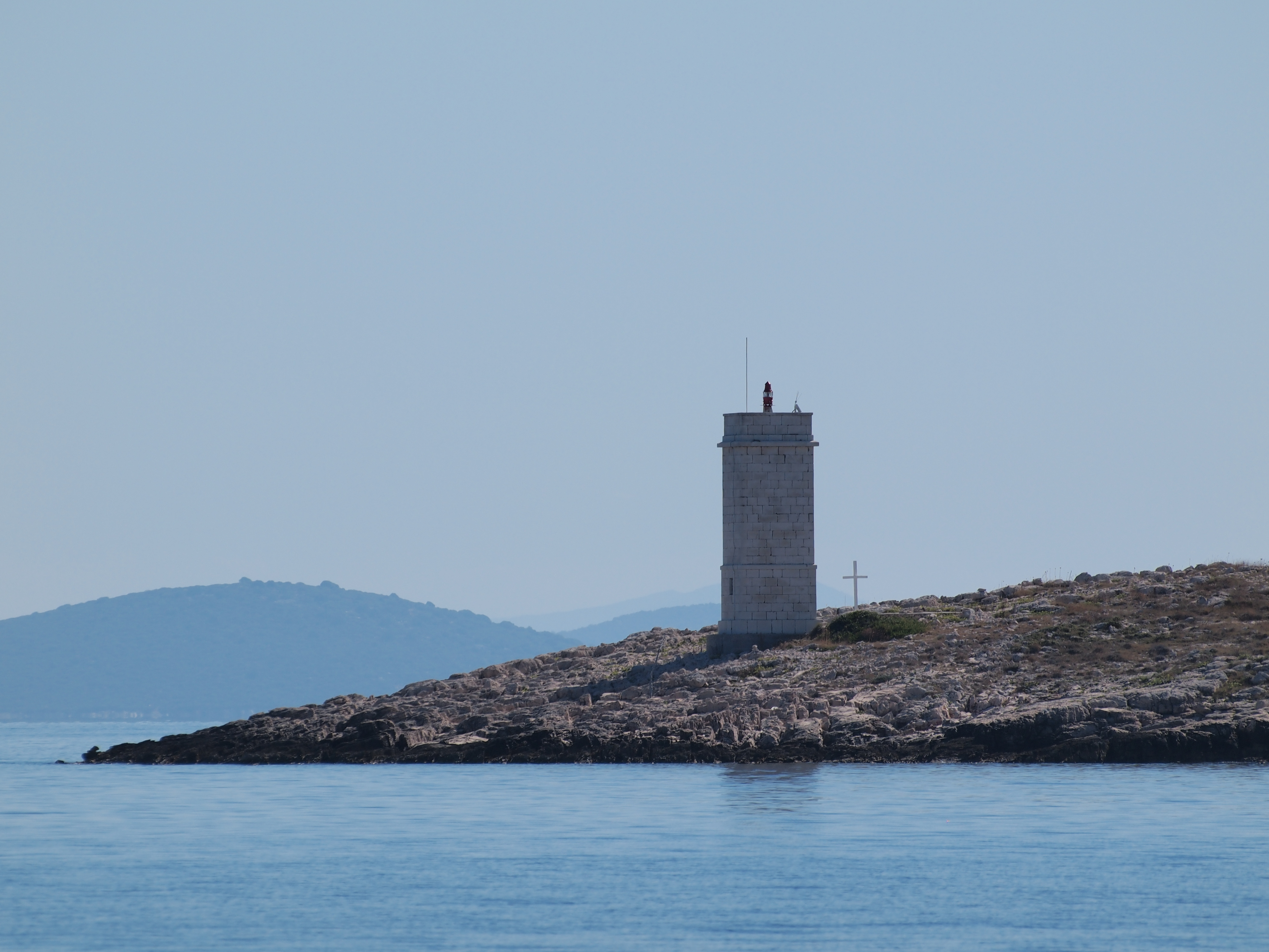 Acht Meter hoher Leuchtturm auf der Insel Smokvica Vela, Kornaten, Kroatien, Standort Object location43° 44′ 03.54″ N, 15° 28′ 22.6″ E Kennung: Fl R. 3s 13m 5sm